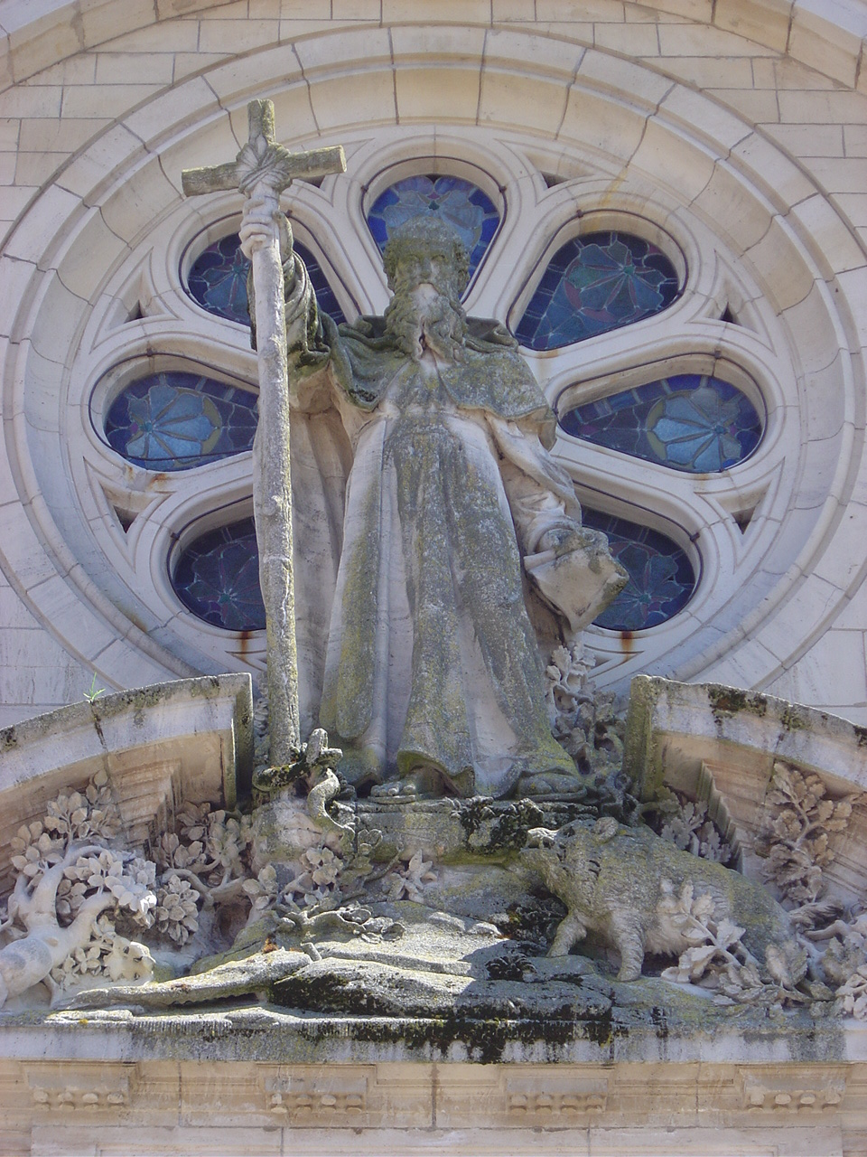 Église Saint-Basle de Dombasle-sur-Meurthe : statue colossale de Saint Basle (Basolus) par Victor Huel.